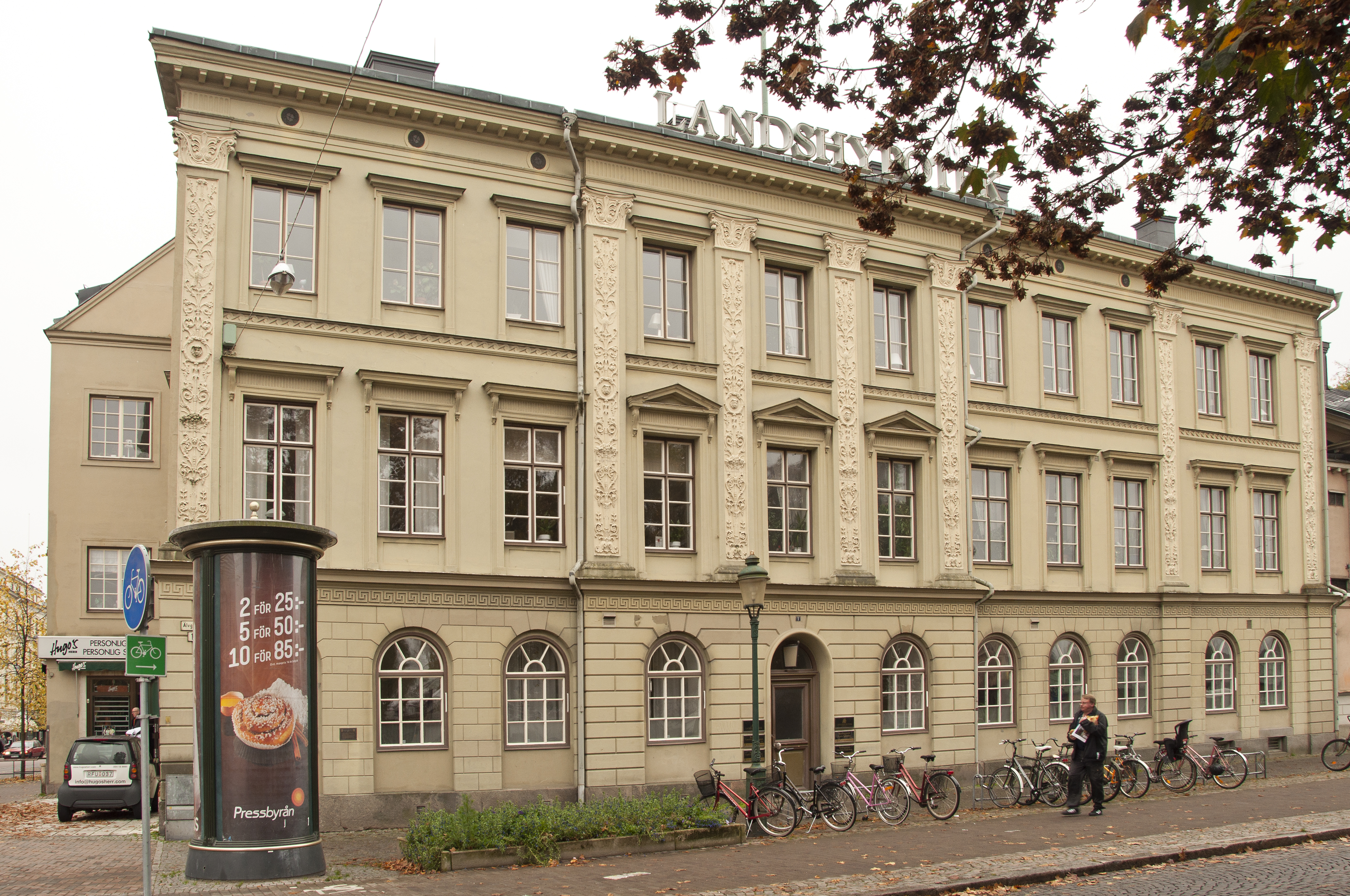 Hypoteksföreningens hus, Karlstad. Byggnadsår 1853, efter ritningar av byggmästaren Jonas Jonsson (1806-1885) från Linköping